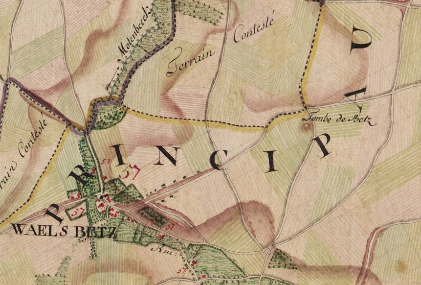 Extrait de la carte de Ferraris n° 133Bb